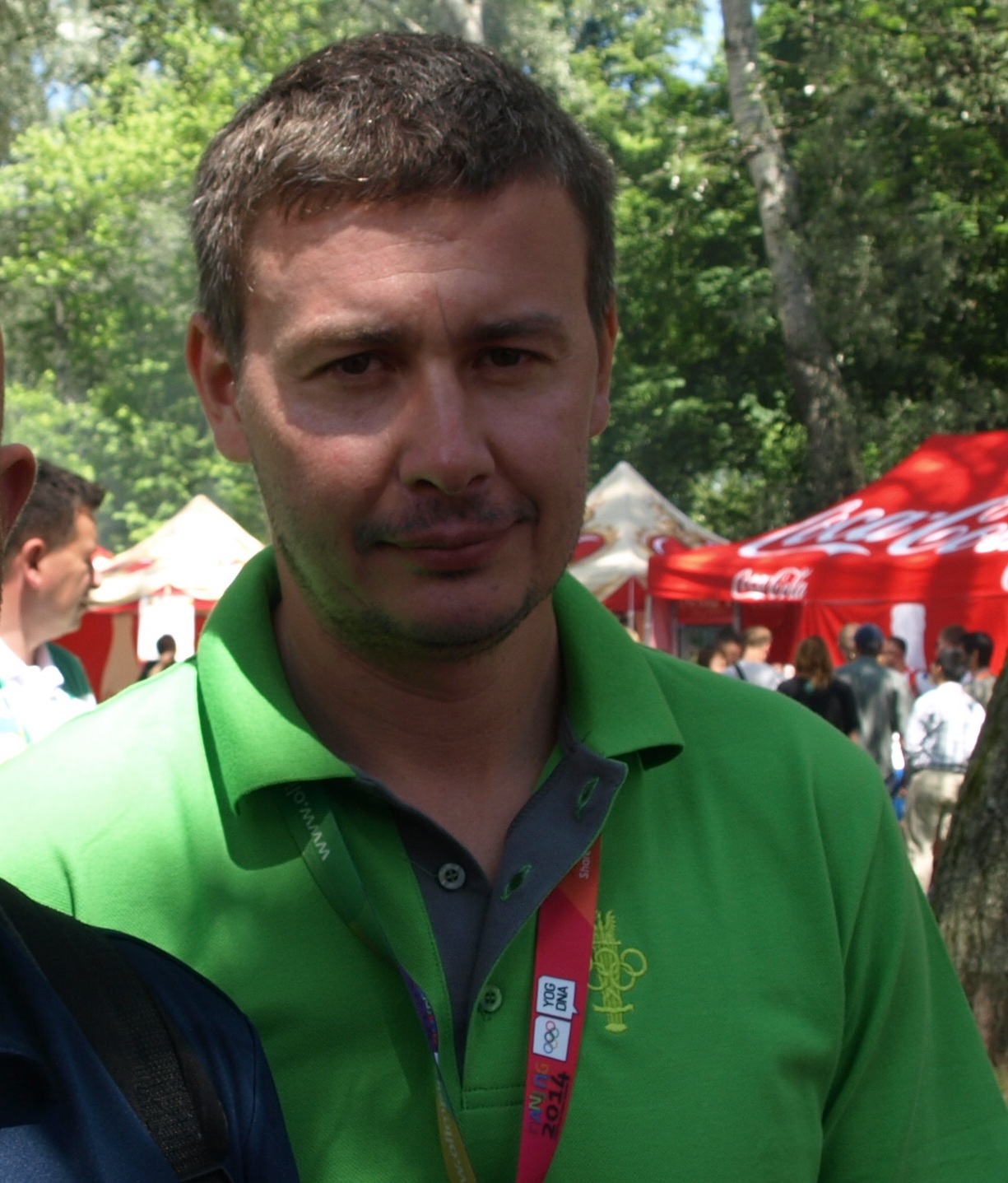 Adam Seroczynski